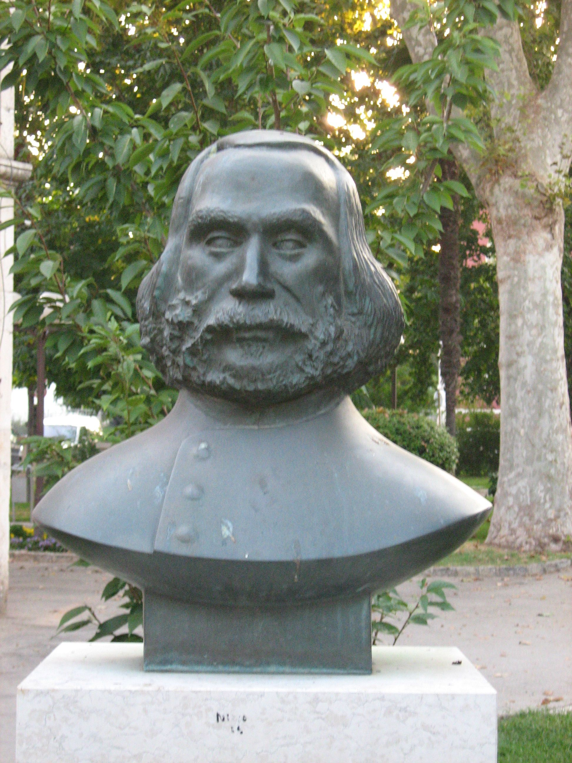 Ante Kuzmanić